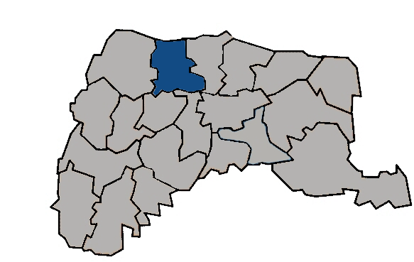 台灣省雲林縣崙背鄉 KaurJmeb於2005年1月28日為編輯zh:崙背鄉所繪製